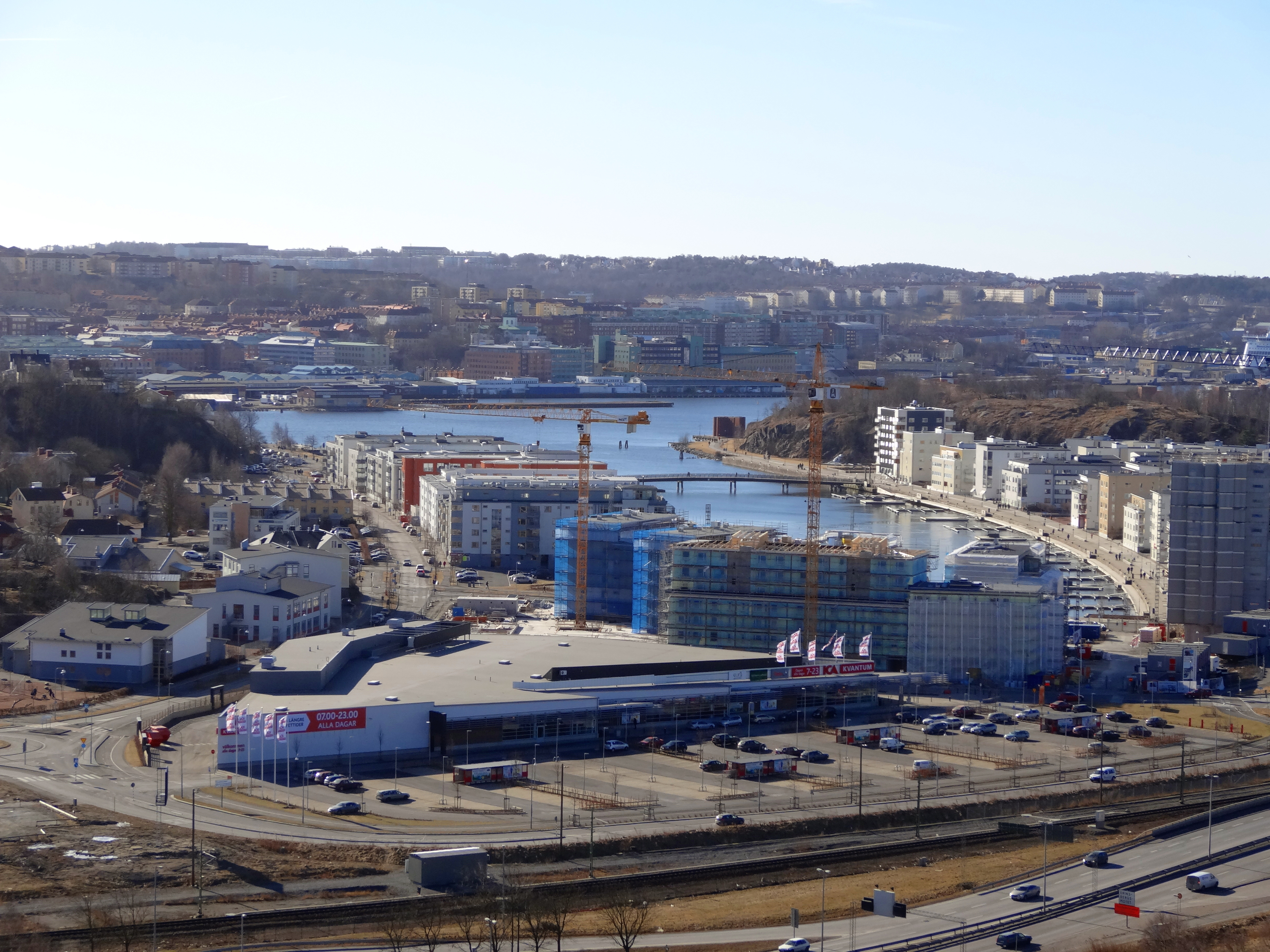 Sannegårdshamnen i Göteborg sedd från toppen av Ramberget i mars 2013. I förgrunden det växande bostadsområdet.